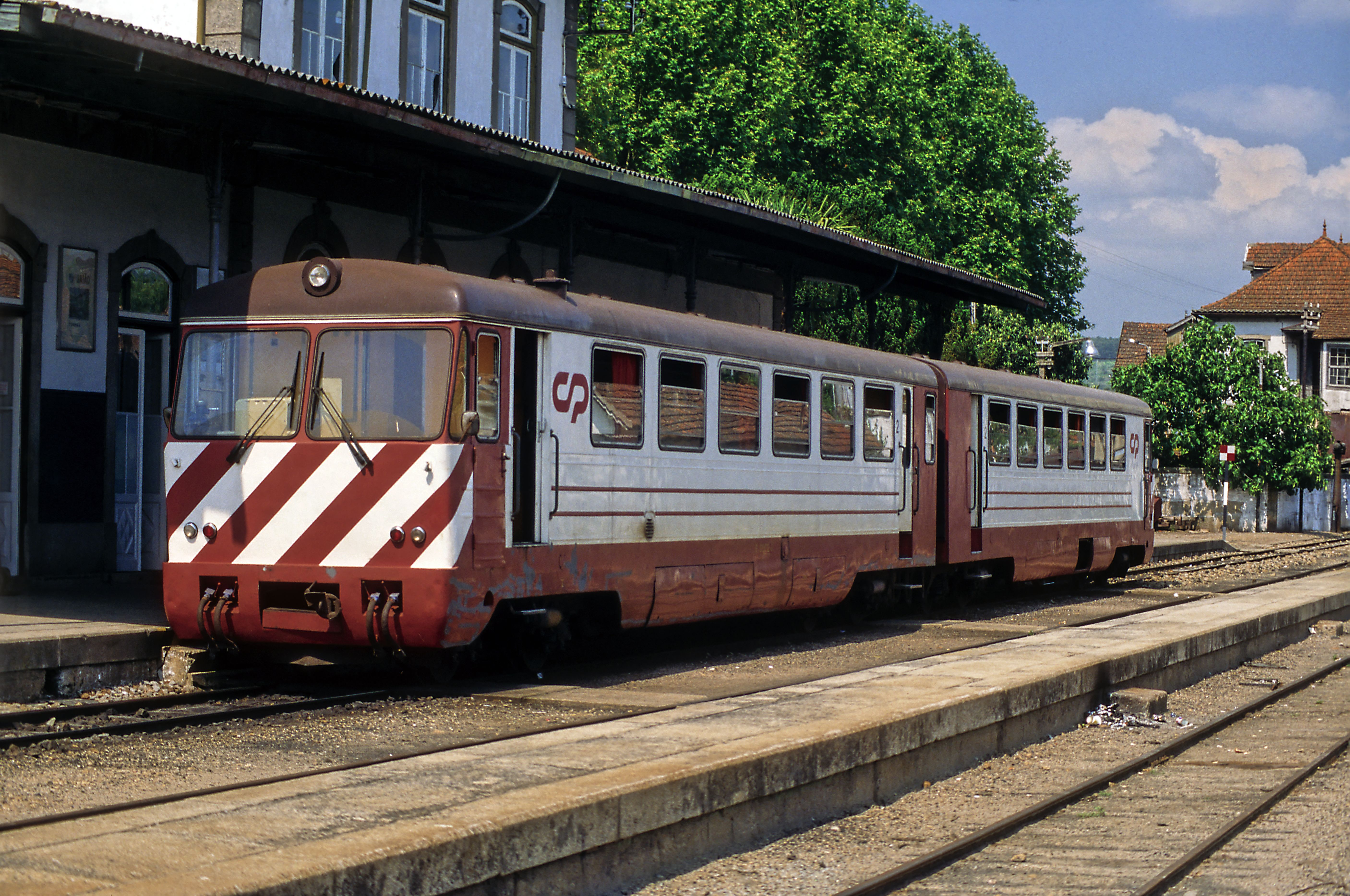 Bf Vila Real, aus Jugoslawien übernommene Triebwageneinheit (ex Bosnabahn)